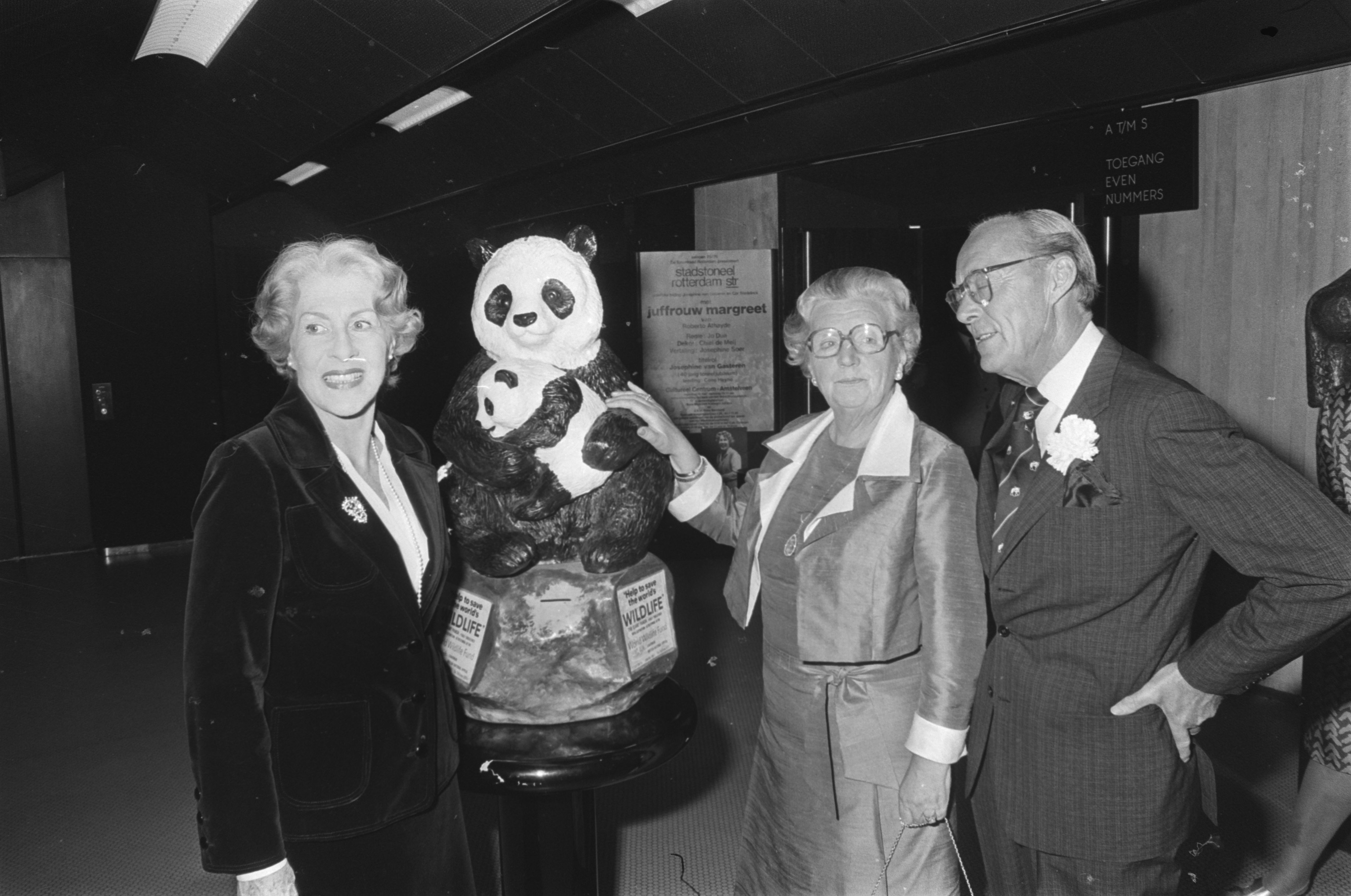 Collectie / Archief : Fotocollectie Anefo Reportage / Serie : [ onbekend ] Beschrijving : Juliana en Bernhard wonen toneelvoorstelling " Juffrouw Margriet " van Josephine van Gasteren bij, opbrengst gaat naar Wereld Natuur Fonds Datum : 10 mei 1976 Trefwoorden : koninginnen, prinsen, toneel Persoonsnaam : Bernhard, prins, Juliana, koningin Instellingsnaam : WNF Fotograaf : Peters, Hans / Anefo Auteursrechthebbende : Nationaal Archief Materiaalsoort : Negatief (zwart/wit) Nummer archiefinventaris : bekijk toegang 2.24.01.05 Bestanddeelnummer : 928-5703